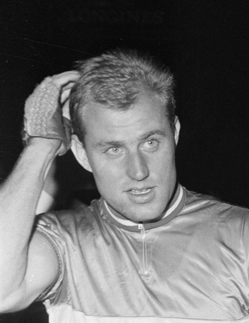 WK Wielrennen, achtste finales sprint amateurs. Trentin kwam ten val.